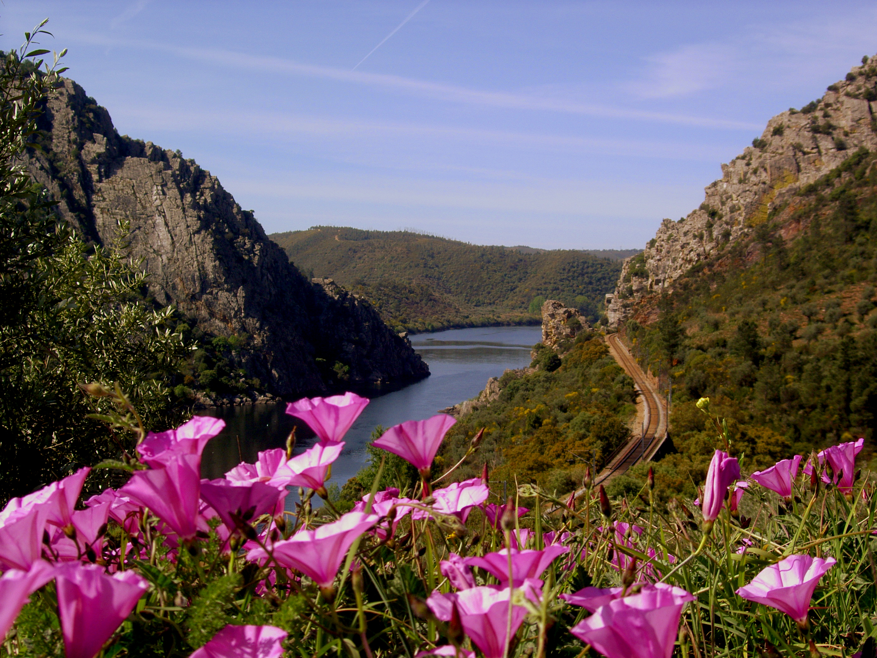 Vila Velha de Ródão, com o Rio Tejo em pano de fundo; Serra da Estrela This is a photography of a Site of Community Importance in Portugal with the ID: PTCON0014. Natura2000 entry, EEA entry